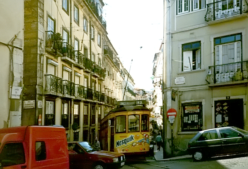 Tram line 12 in the traffic of Lisbon.